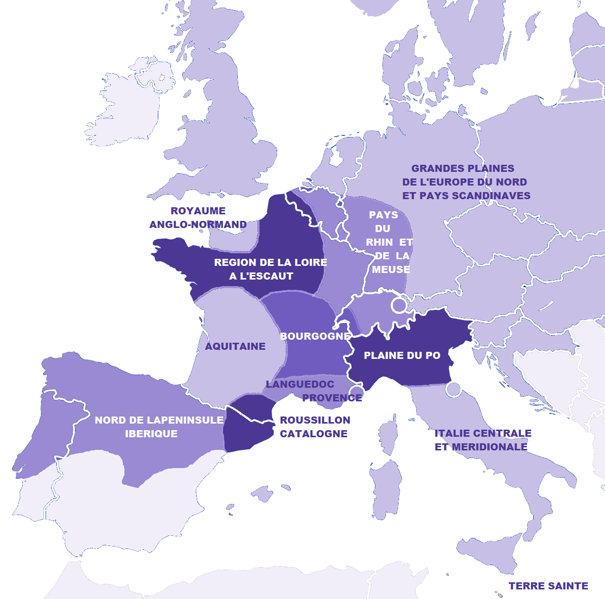 Carte de l'architecture romane (image Commns modifiée)